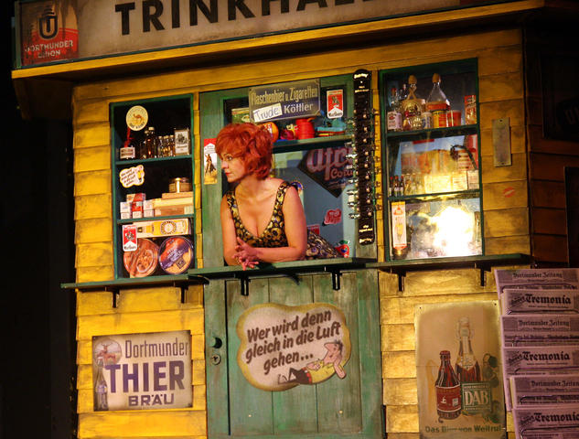 Theater / Revue "leuchte auf mein Stern borussia " von und mit Bruno Knust [Foto: Dieter Menne, RNDatum: 3. September 2009]